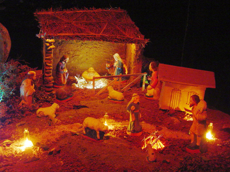 ക്രിസ്മസിനോടനുബന്ധിച്ച് വീടുകളിലുണ്ടാക്കുന്ന പുൽക്കൂട്.